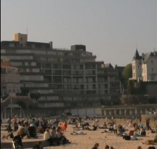 L'hôtel de luxe le Crystal, extrêmement imposant et massif, a pris la place de l'ancien hôtel Crystal du XIXème siècle